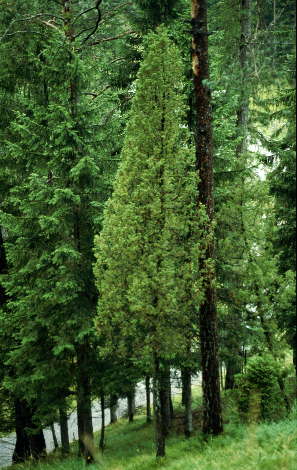 Wacholder (Juniperus communis subsp. communis), Zypressengewächse (Cupressaceae) - Österreich/Austria/Autriche: Tirol, Biberwier